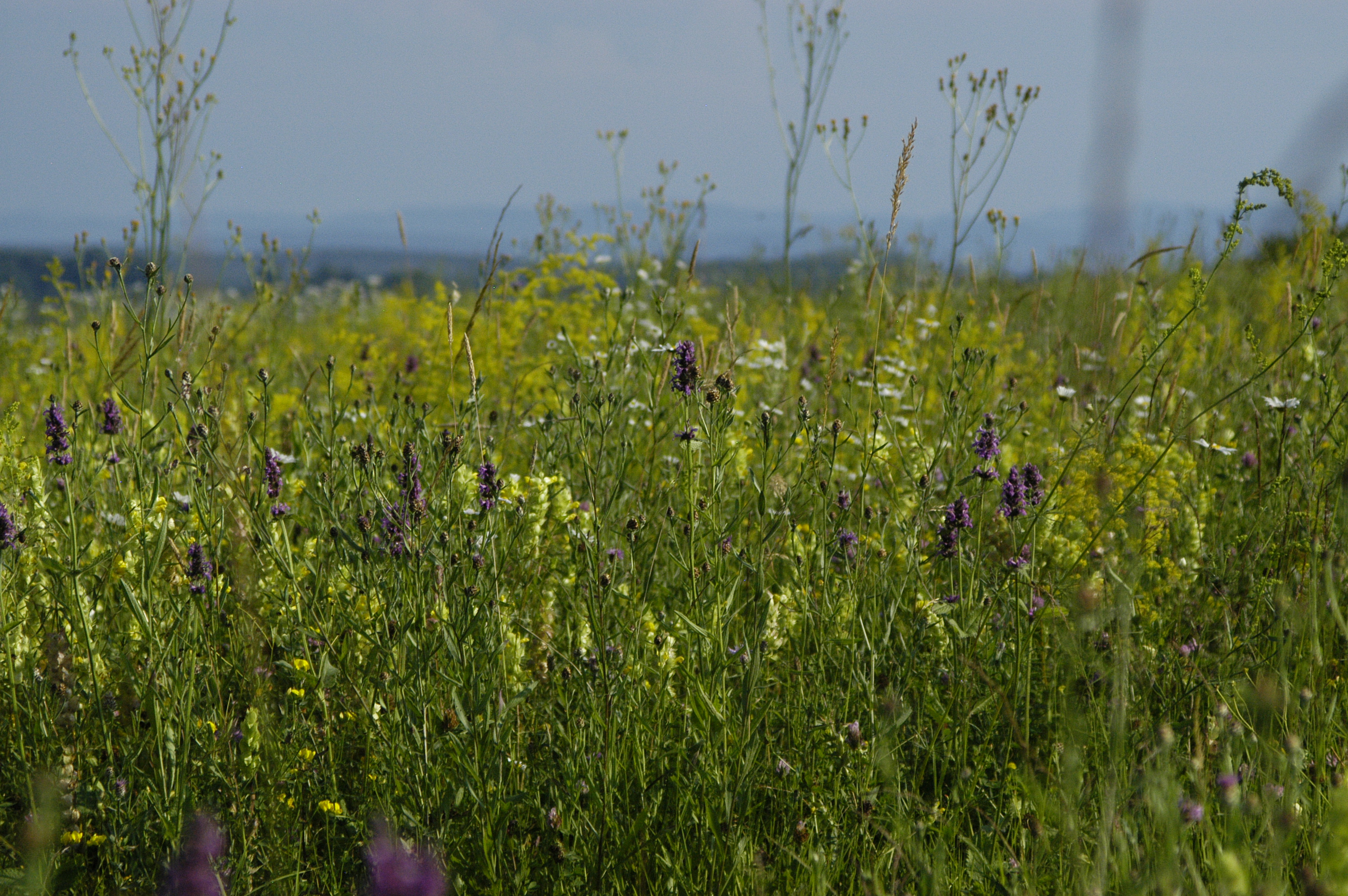 Прикарпатські луки